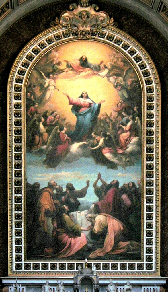 Hlavný oltár v ostrihomskej bazilike